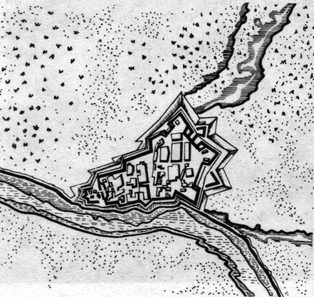 Беларуская (тарашкевіца): Рагачоў (Rahačoŭ). Плян места і замка